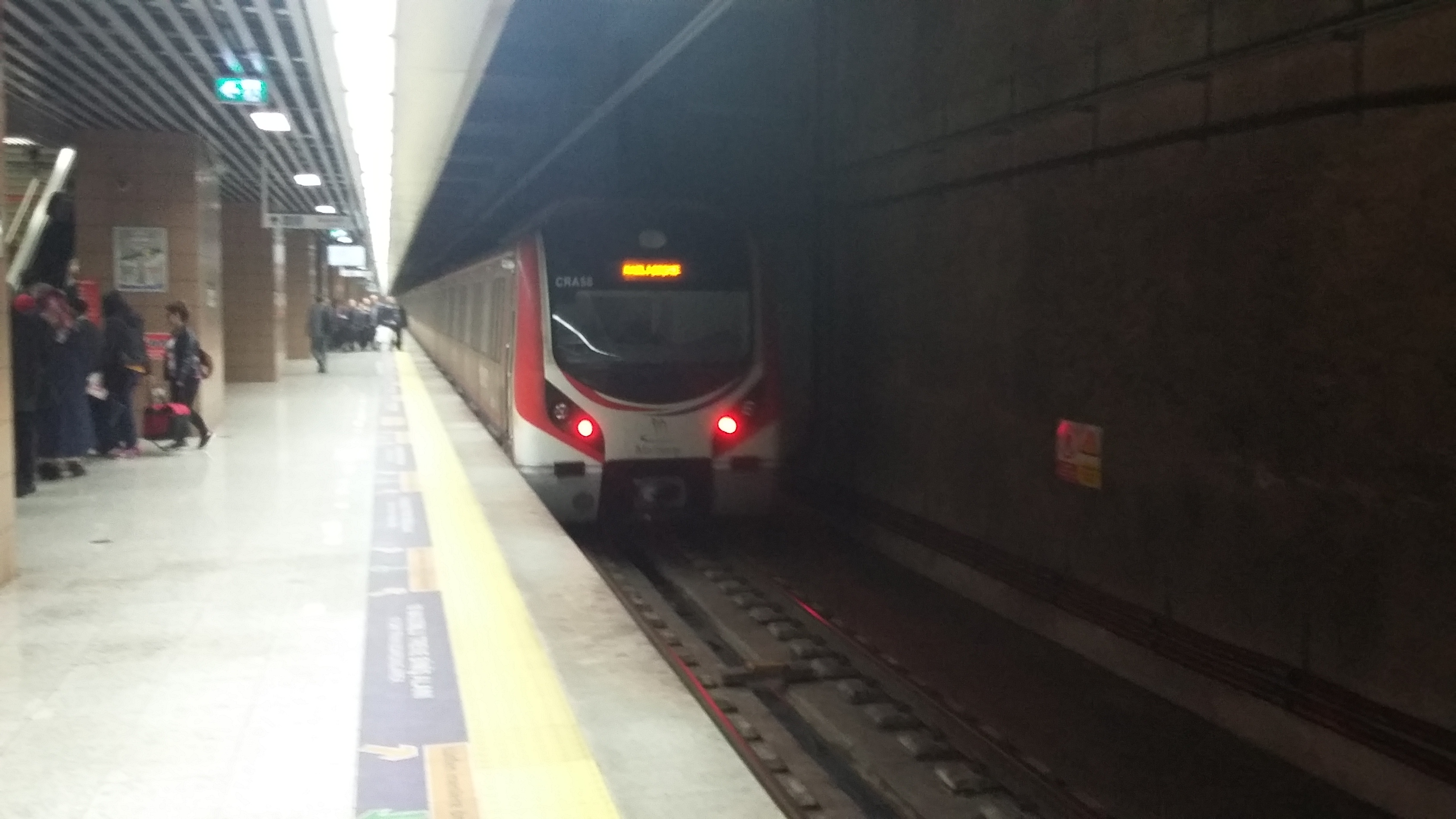 BC1 YENİKAPI MARMARAY